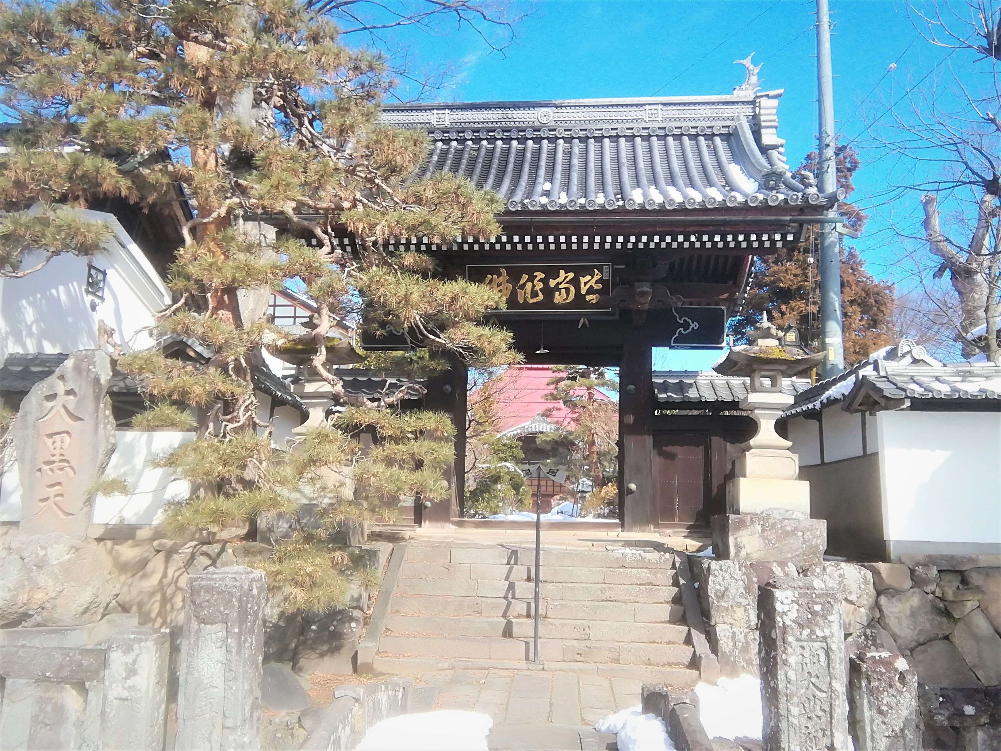 鈴泉寺(2020-2-12)